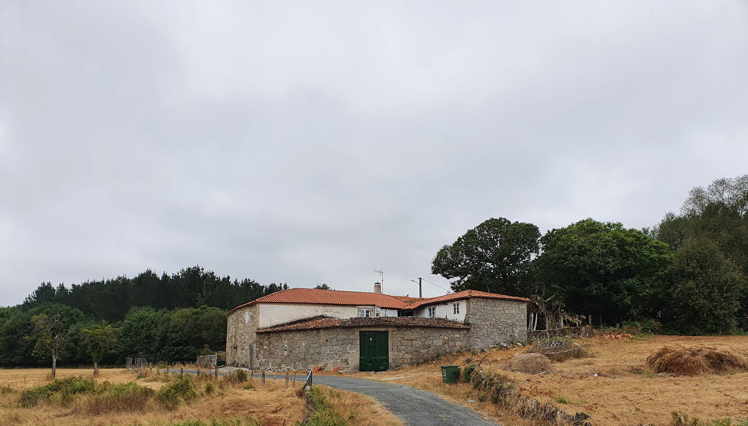 Lugar da Ribadulla, na parroquia de Dorra (Antas de Ulla). A escasos vinte metros da única vivenda do lugar, en dirección oeste, atópase o río Ulla que fai linde co Concello de Monterroso.